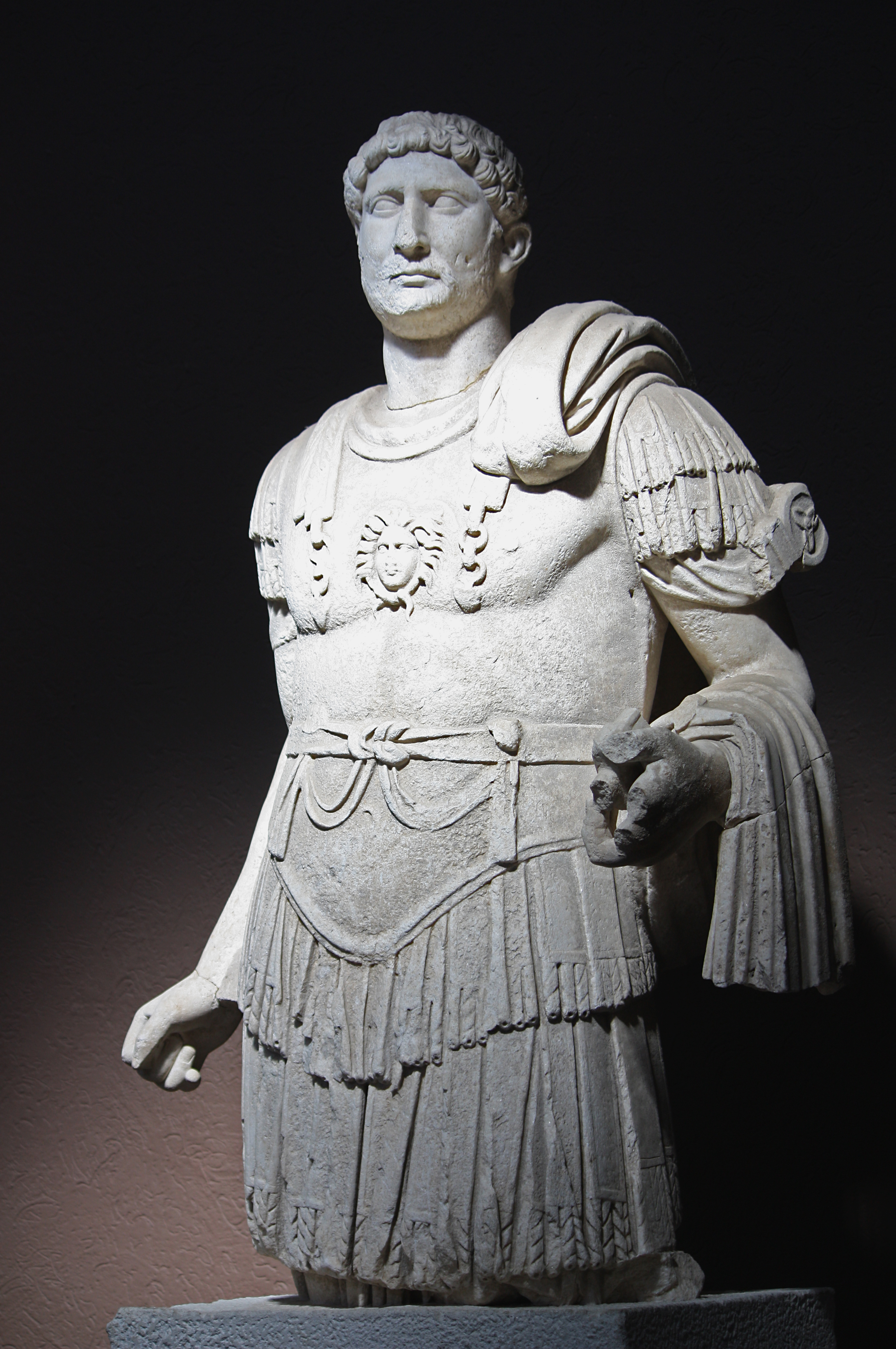 Archäologisches Museum Çanakkale, Türkei, Statue Kaiser Hadrians aus Troja